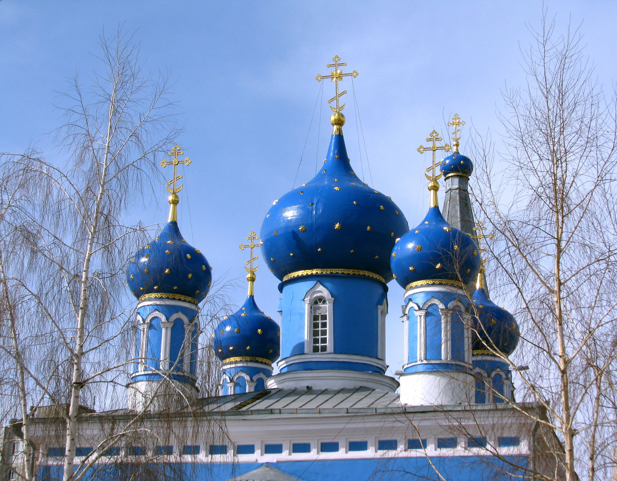 упола Успенской церкви